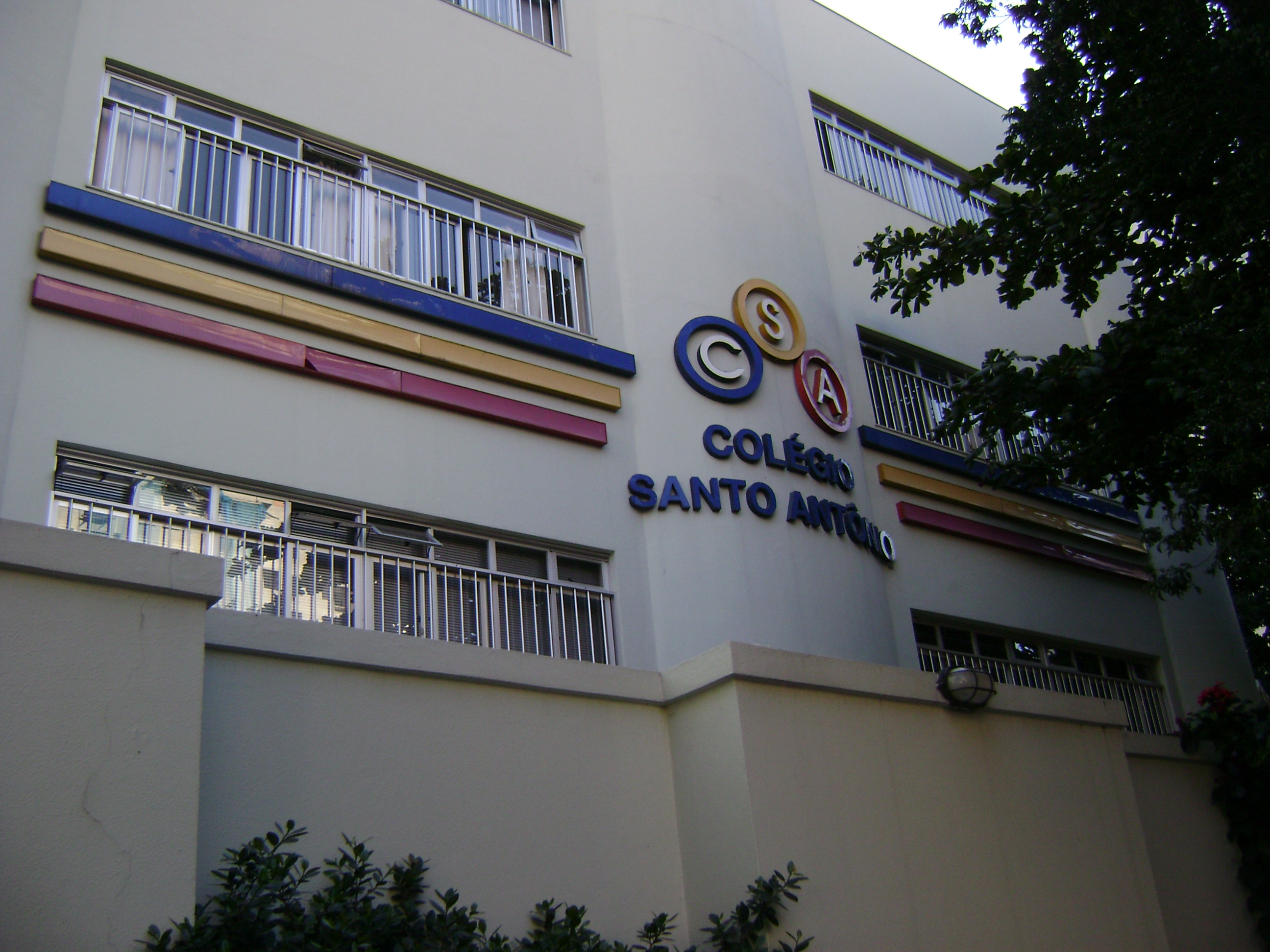 Fachada de edificação do Colégio Santo Antônio, na rua Pernambuco, na Savassi, Belo Horizonte.